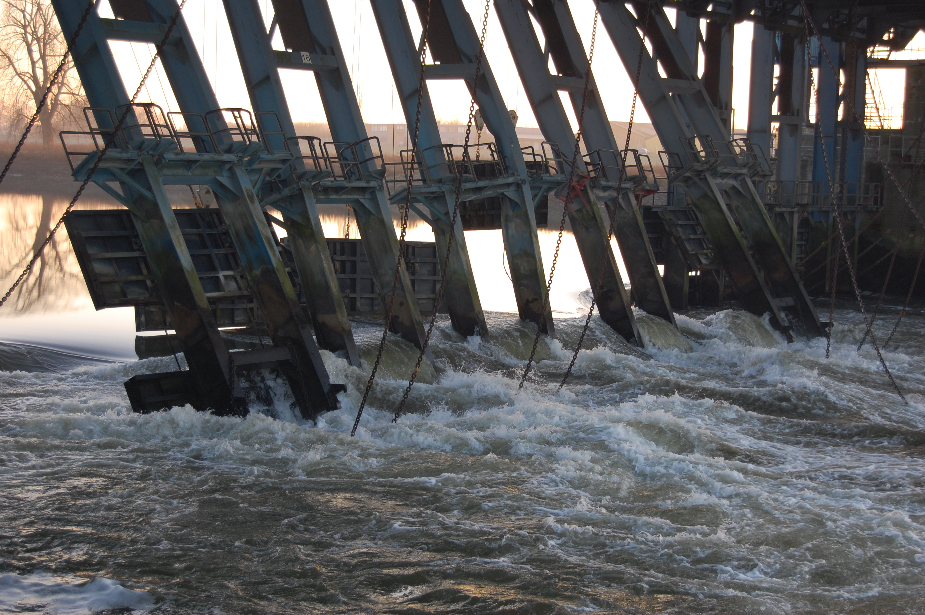 Stuw Grave, Schade stuw